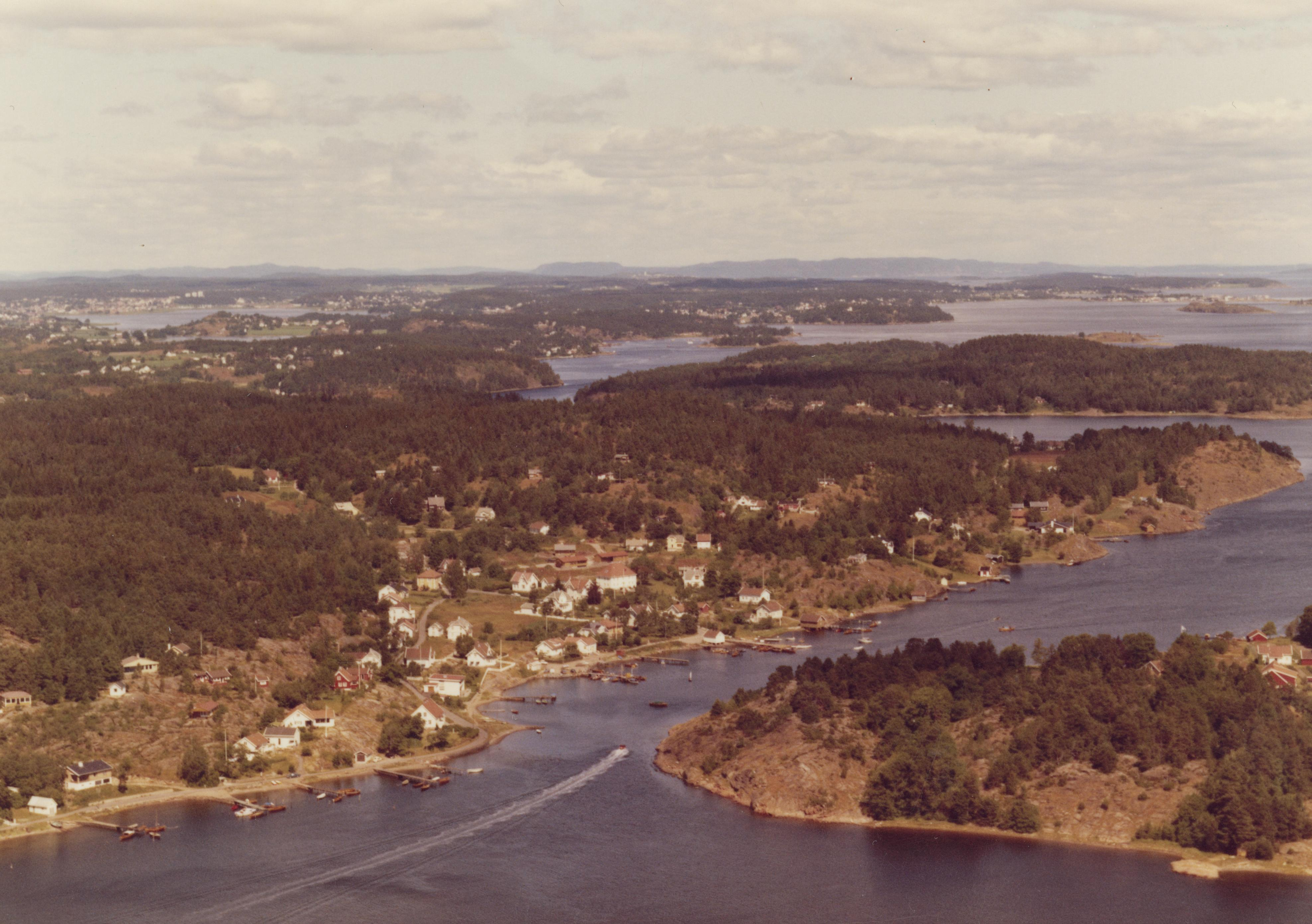 WF.S.178953